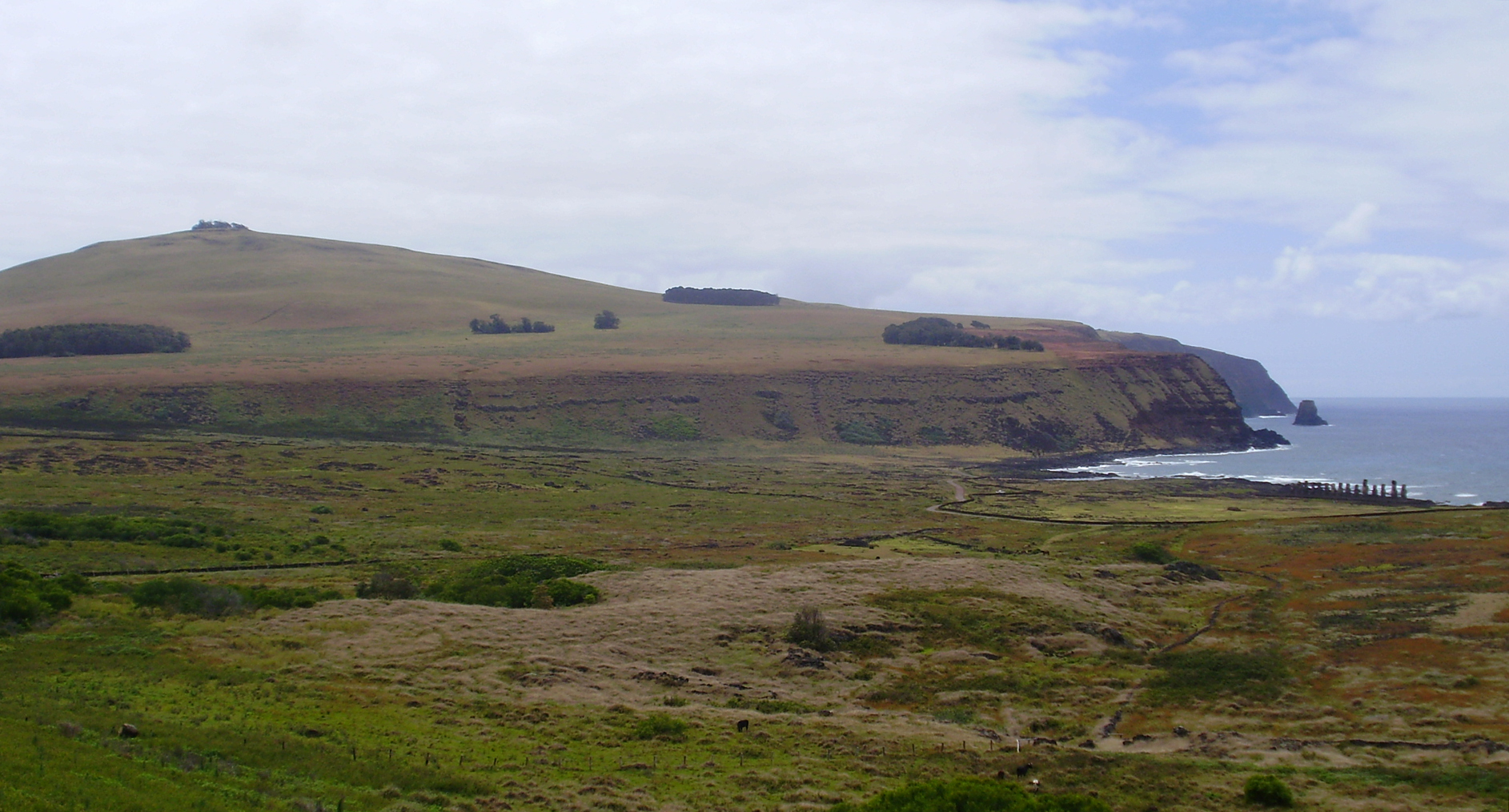 Volcán Poike, en isla de Pascua, Chile.